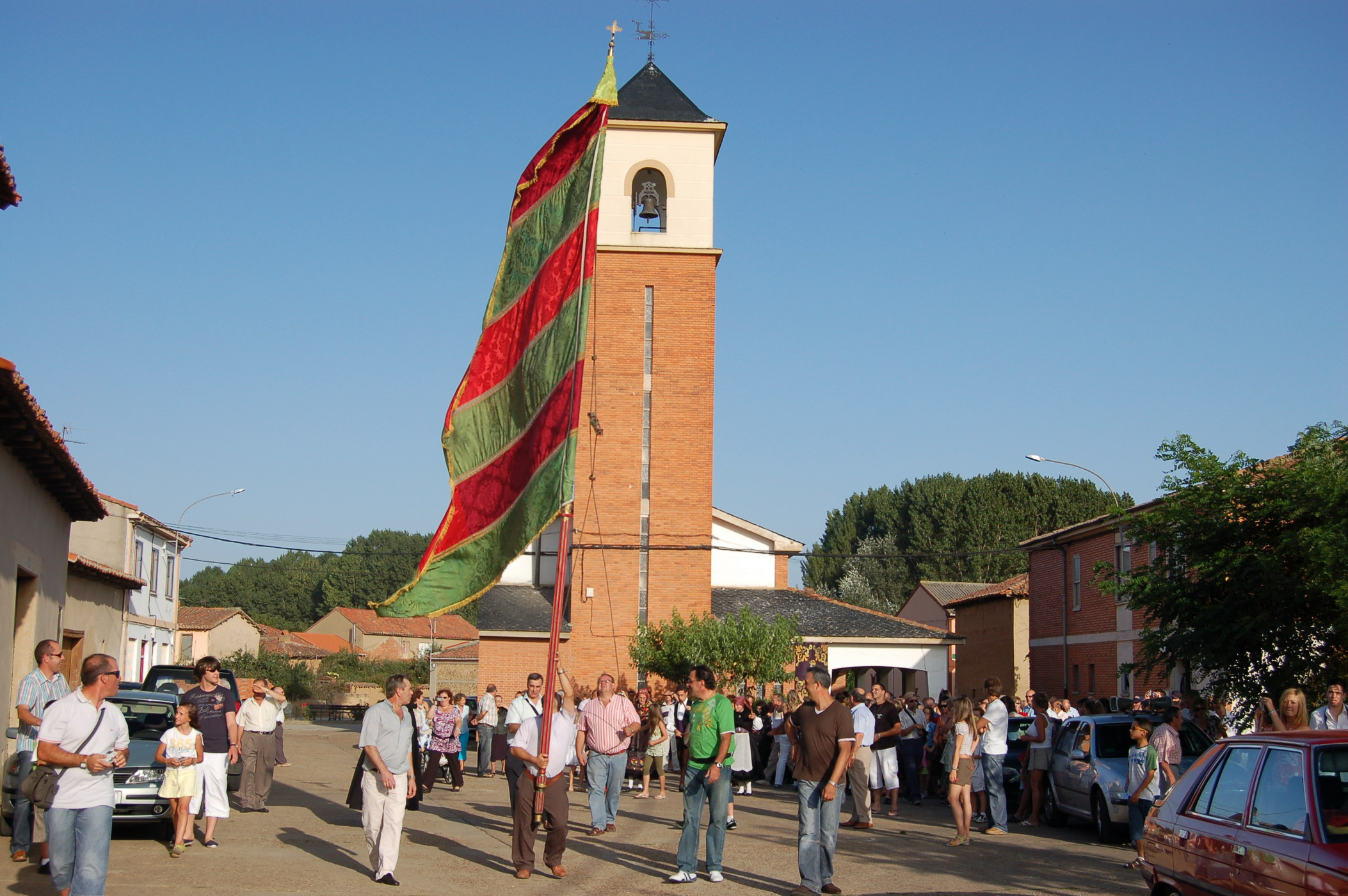 Presentación oficial del pendón de Turcia, después de su restauración, el día 4 de agosto del año 2007.